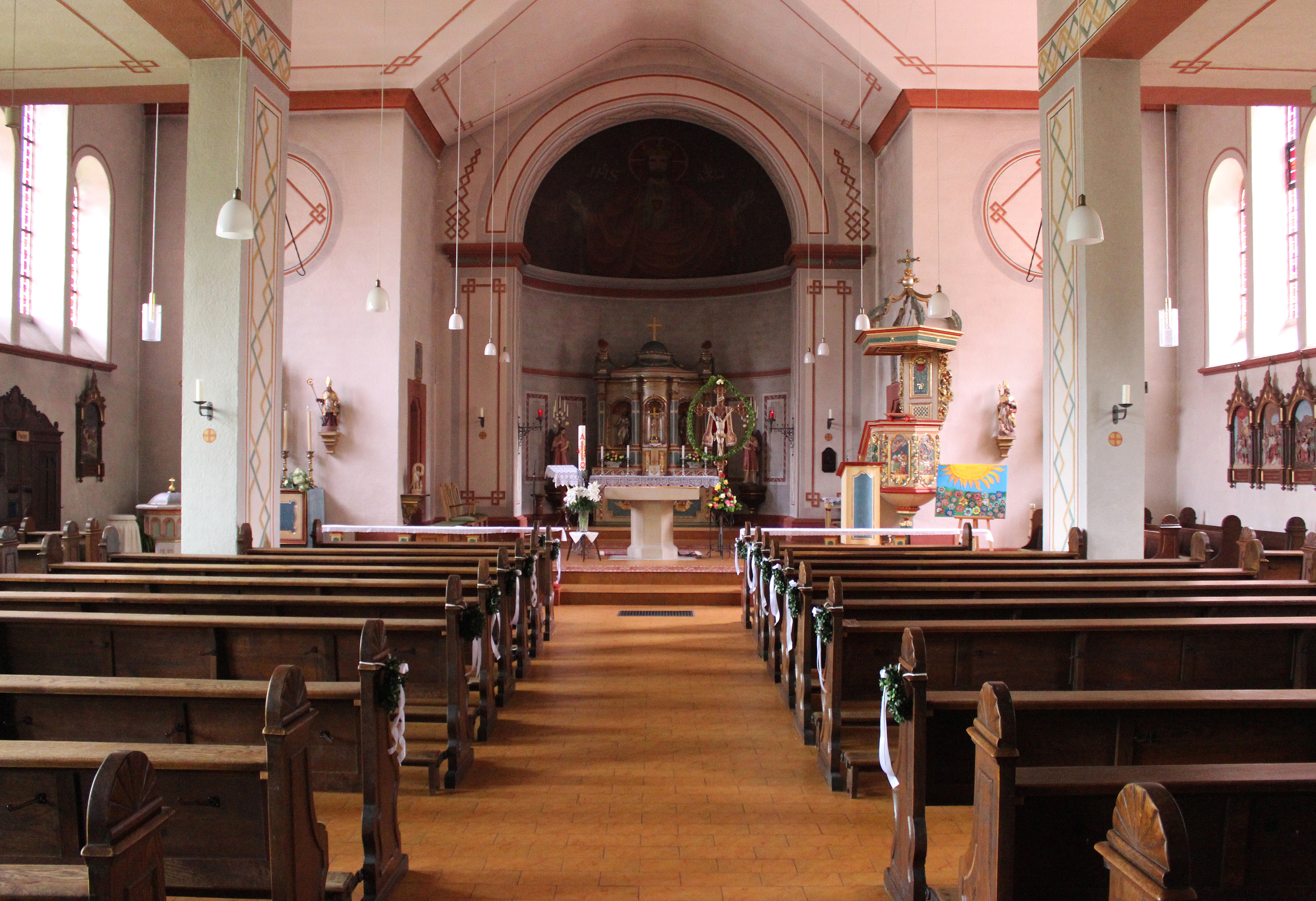 Blick ins Innere der katholischen Pfarrkirche St. Antonius in Saarhölzbach, einem Ortsteil der Gemeinde Mettlach, Landkreis Merzig-Wadern, Saarland